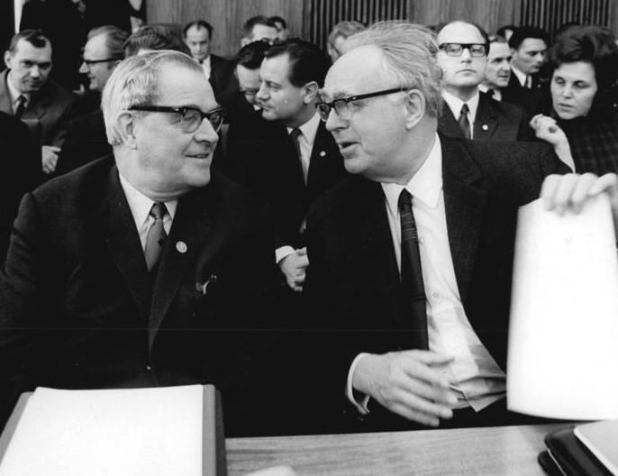 Zentralbild Junge 12.3.1970 Berlin: 22. Sitzung des Staatsrates. Unter Leitung seines Vorsitzenden Walter Ulbricht trat am 12. März 1970 der Staatsrat der DDR zu seiner 22. Sitzung zusammen. Als Gäste nahmen hervorragende Persönlichkeiten auf dem Gebiet der Wissenschaften teil. Prof. Dr. Hermann Klare (vorne l.), Präsident der Deutschen Akademie der Wissenschaften, hier vor Beginn der Sitzung im Gespräch mit dem Vorsitzenden des Forschungsrates der DDR, Prof. Dr. Dr. Max Steenbeck, erläuterte den Bericht über die Durchführung der Akademiereform unter besonderer Berücksichtigung der Wissenschaftsorganisation.